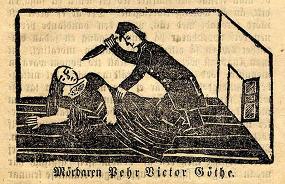 F.d. gardisten Pehr Victor Göthe. Mamsell Anna Sofia Forssbergs mördare. Påskdagen 1861.